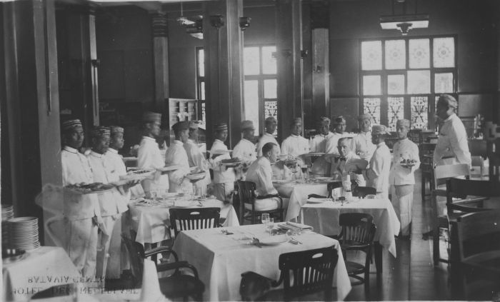 Prentbriefkaart. Bedienend personeel in het restaurant van Hotel der Nederlanden te Batavia